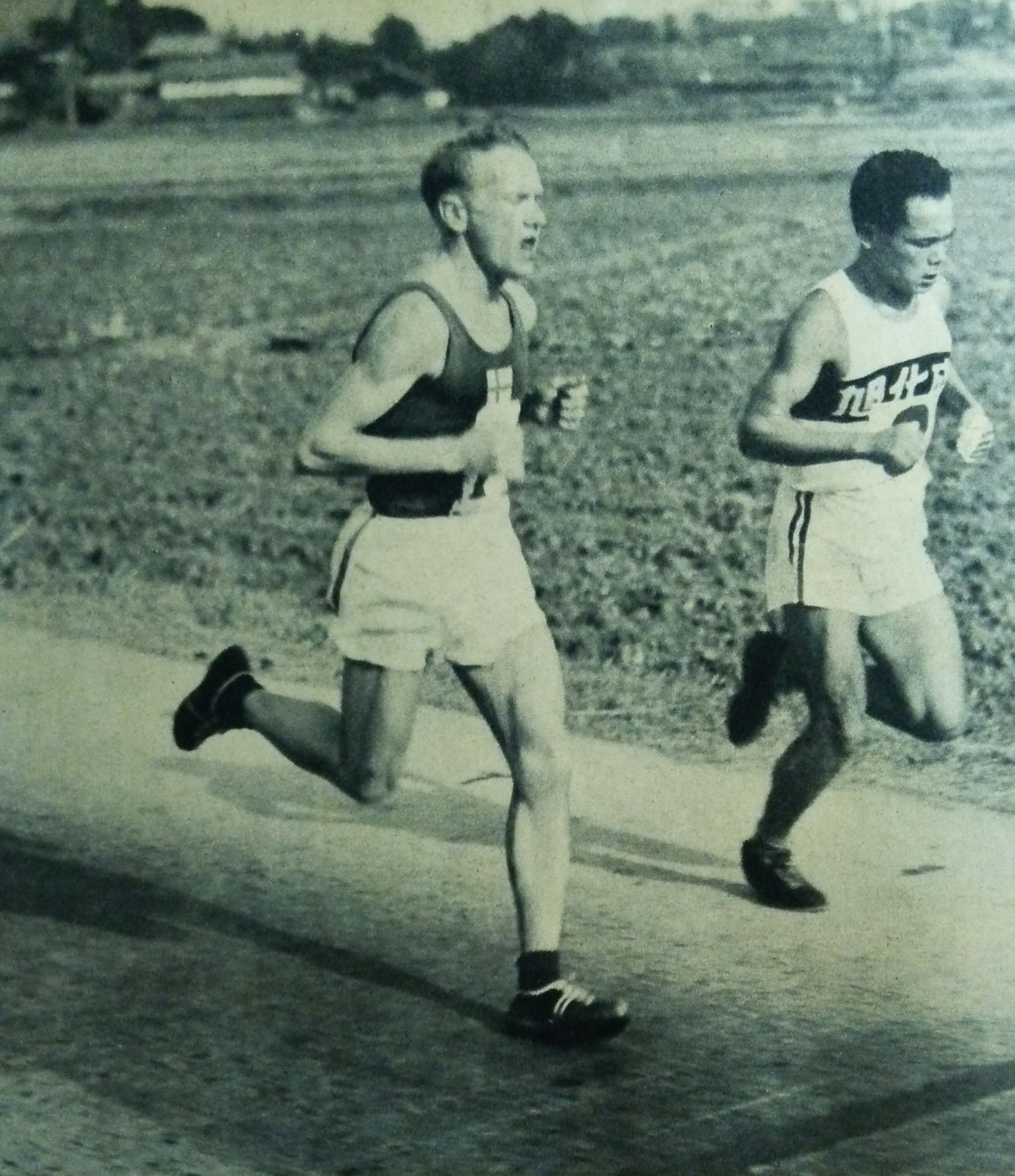 ヴェイッコ・カルボネンと廣島庫夫（第9回朝日国際マラソンにて）